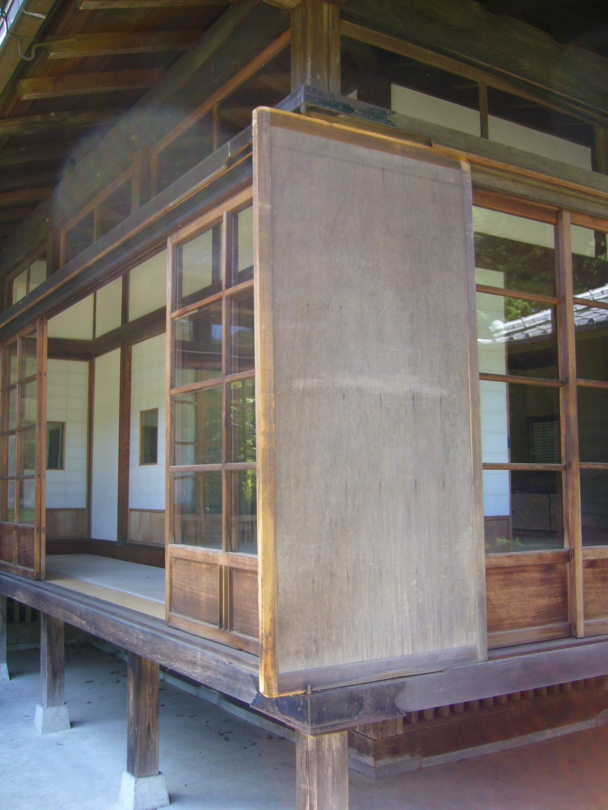 storm-door,amado,narita-city,japan